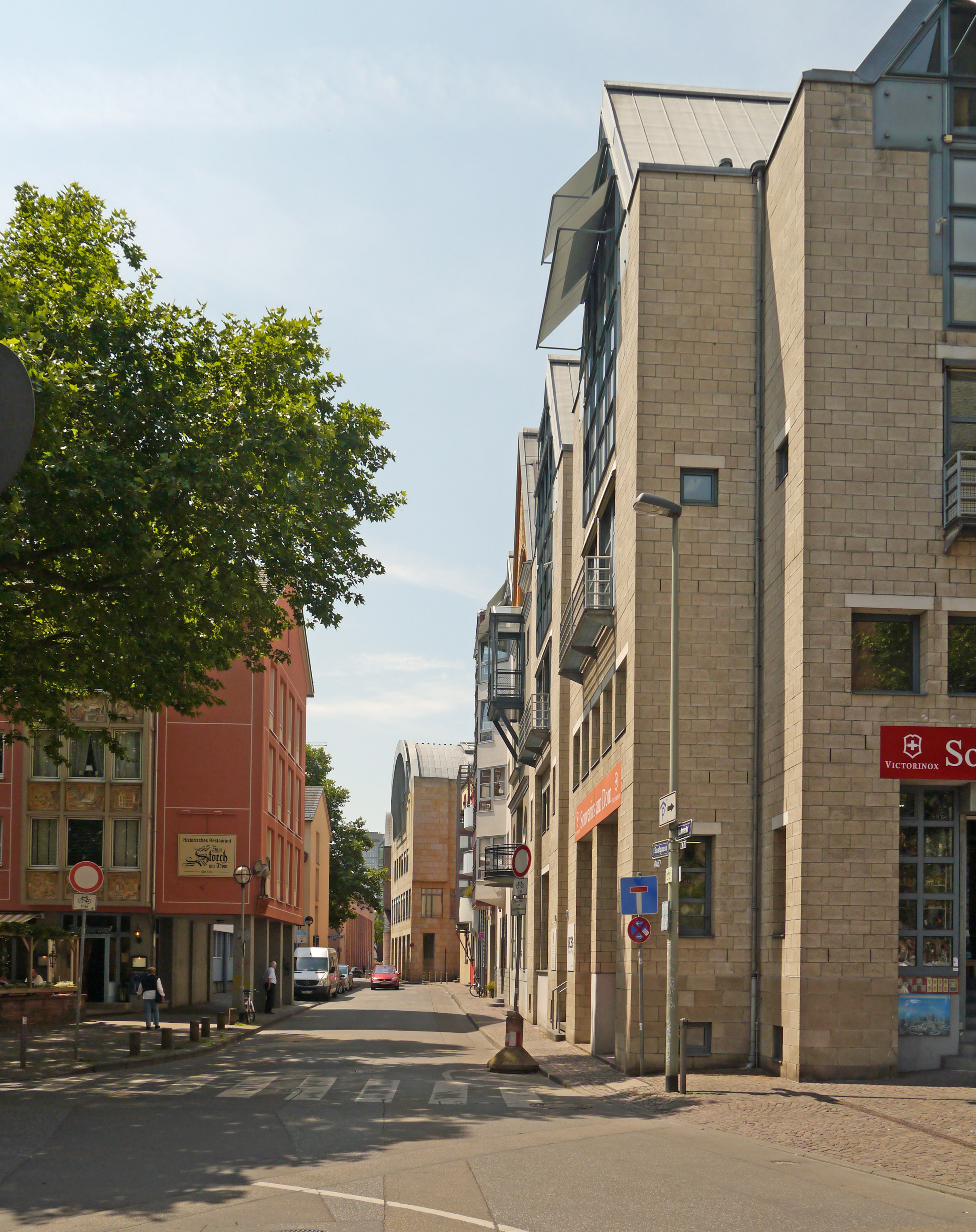 Die Saalgasse, 2017 vom Weckmarkt bis zum Historischen Museum in Frankfurt am Main